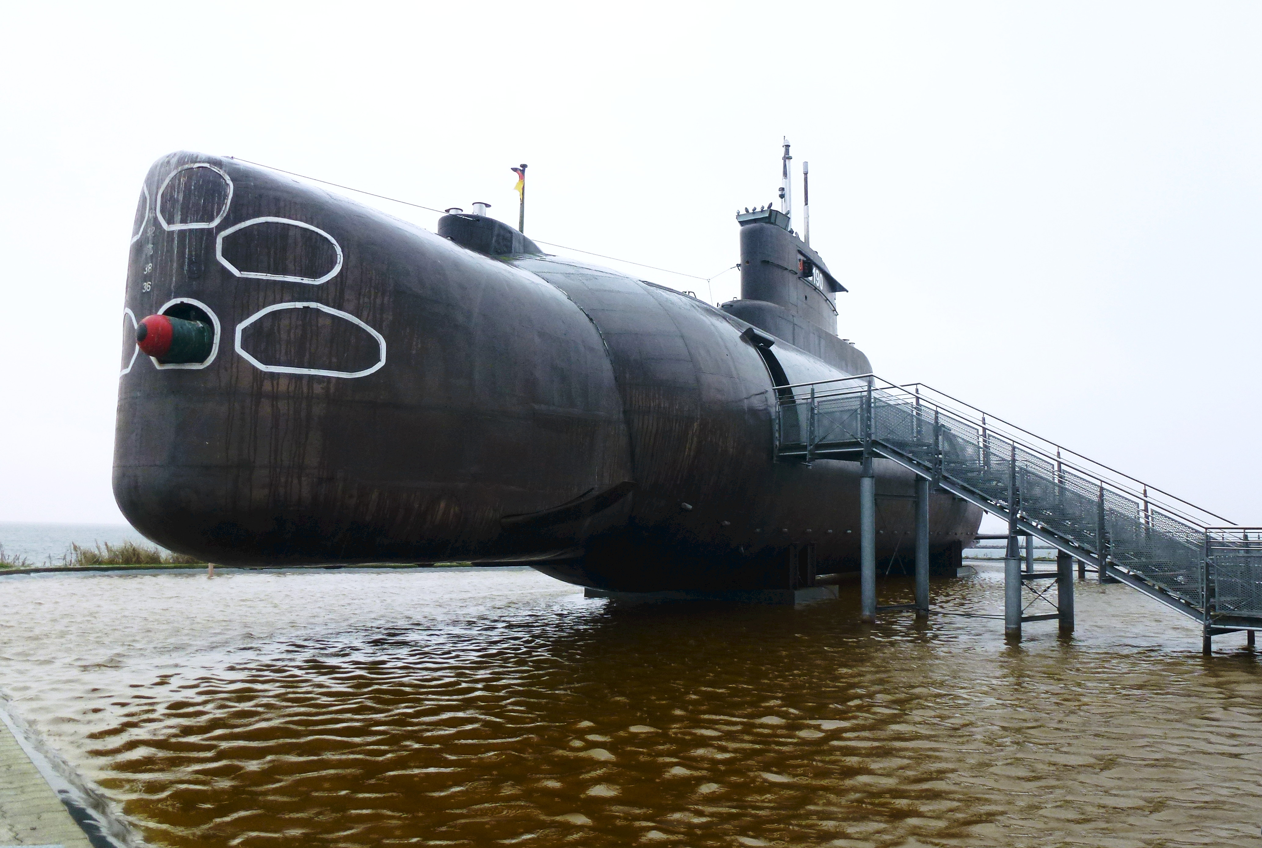 U 11 (Bundeswehr) als Museum in Burgstaaken